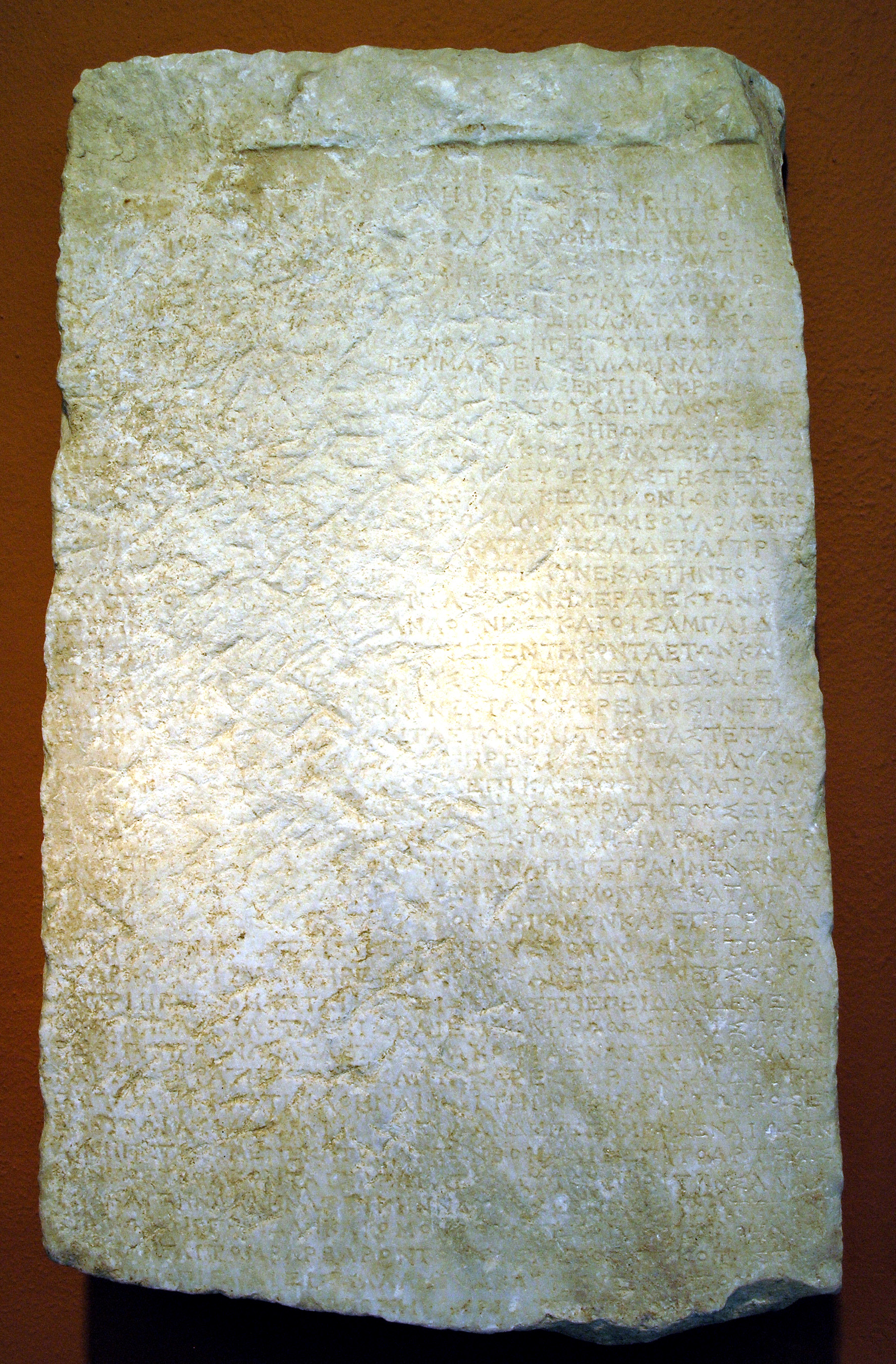 Décret de Thémistocle trouvé à Damalas de Trézène concernant l'évacuation des Athéniens et la défense navale de la cité avant la bataille de Salamine en 480 av. J.-C. Copie du IIIe s. av. J.-C.